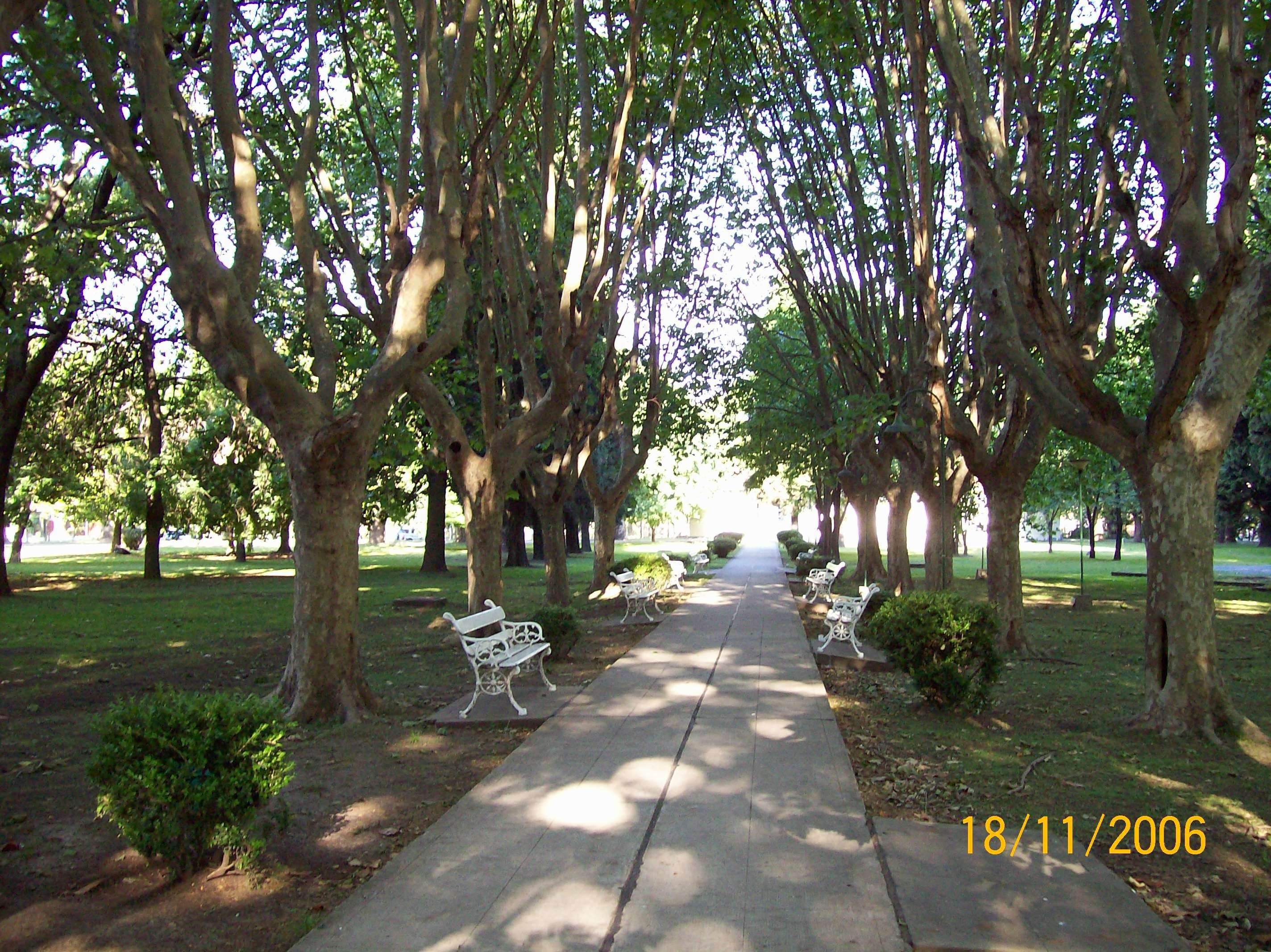 Paseo peatonal interno